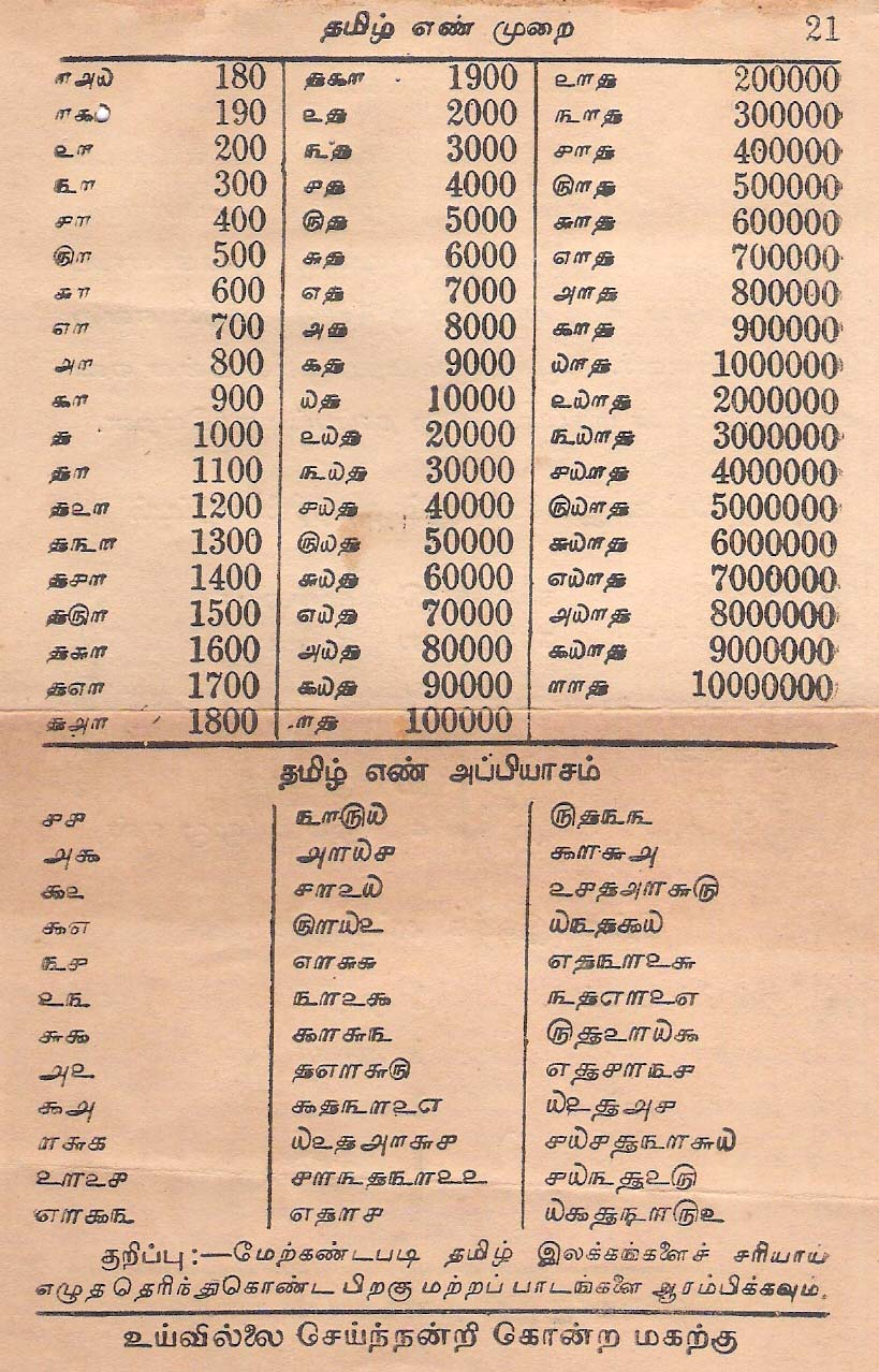 தமிழ்